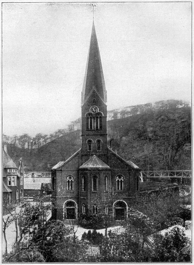 Pauluskirche, Wuppertal-Unterbarmen, after 1882 1901